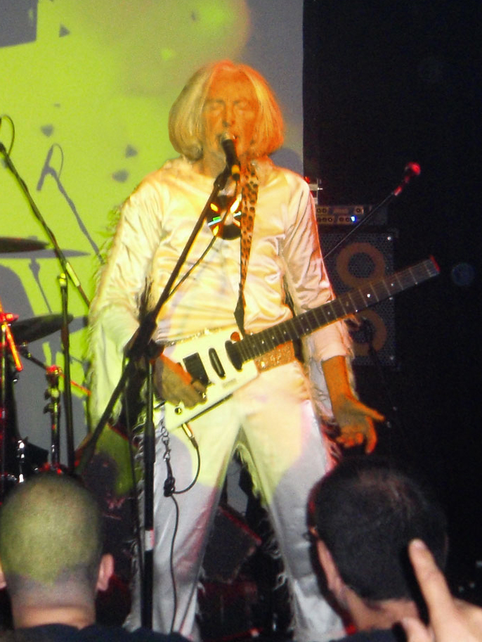 derived edit of File:Gong-Zappa-Tel-Aviv-2009-10-31-20.jpg (cc-by-sa3.0)